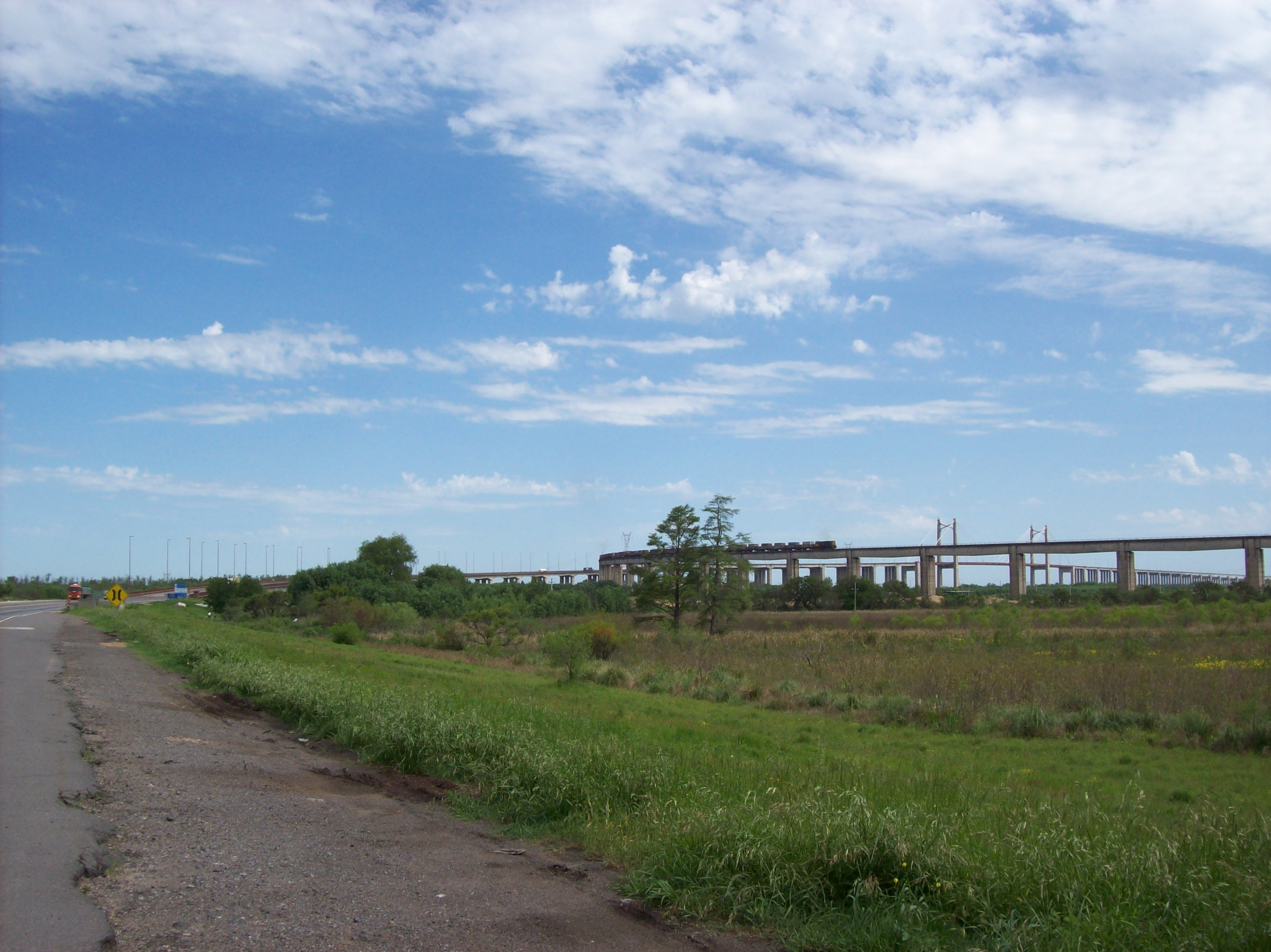 Urquiza Bridge over Paraná Guazú river, in Buenos Aires - Entre Ríos border, Argentina